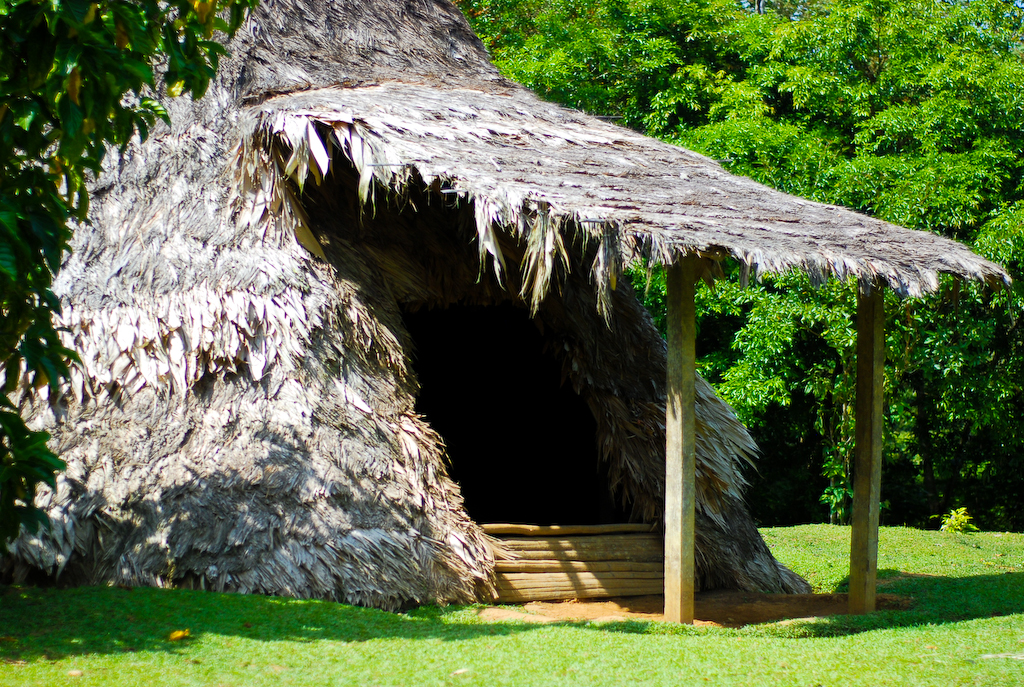 Palenque bribri en Talamanca, Limón. Costa Rica.